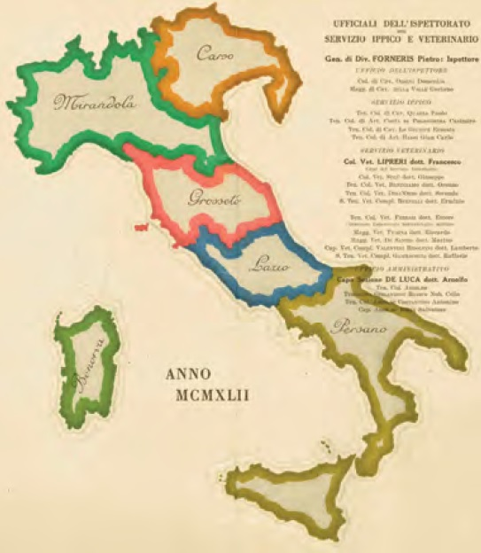 Ufficiali dell'ispettorato del servizio ippico e veterinario. Suddivisione territoriale degli allevamenti dei quadrupedi dell'esercito italiano nel 1942 (Mirandola, Carso, Grosseto, Lazio, Persano e Bonorva)